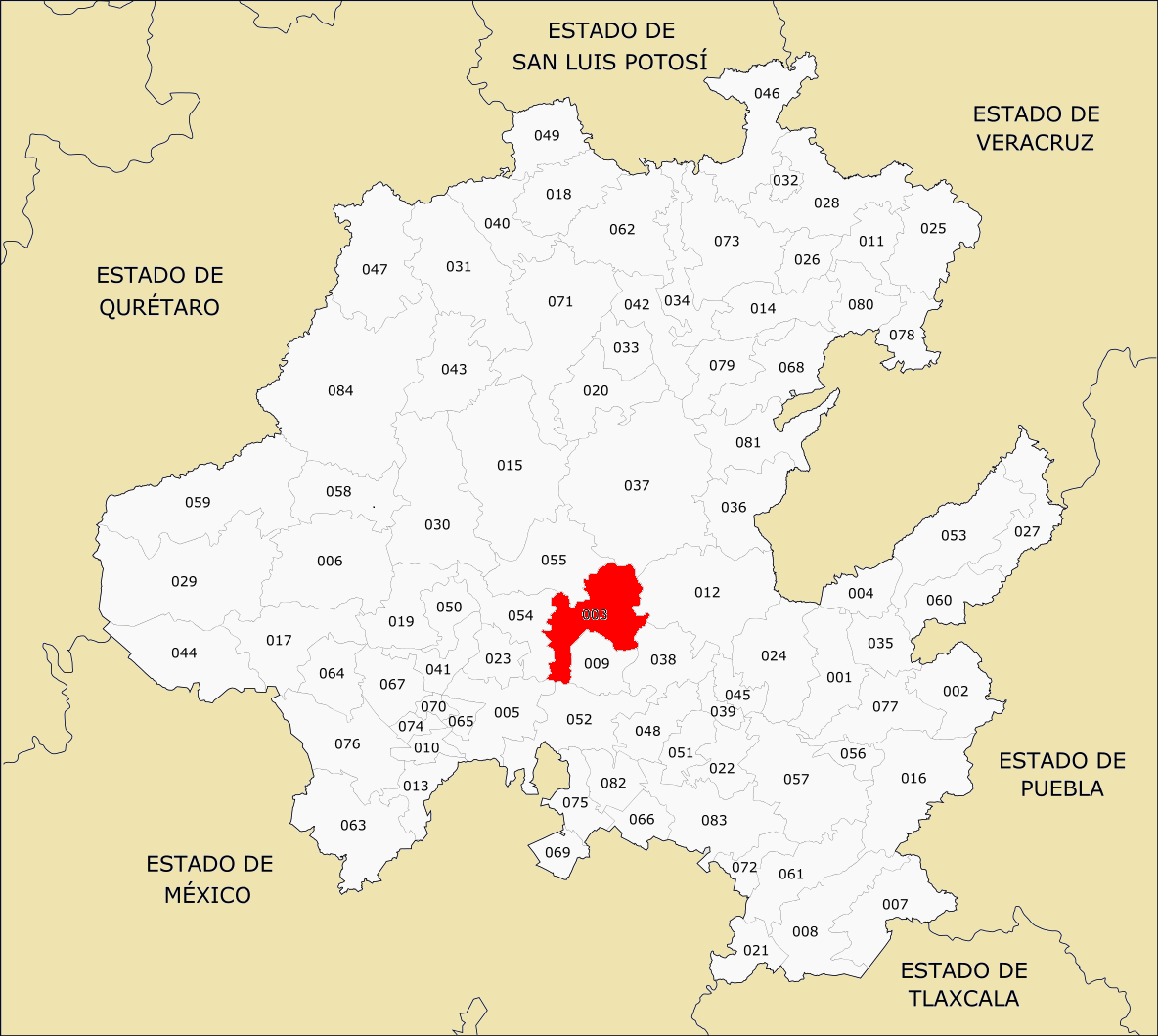 003 Municipios de Hidalgo